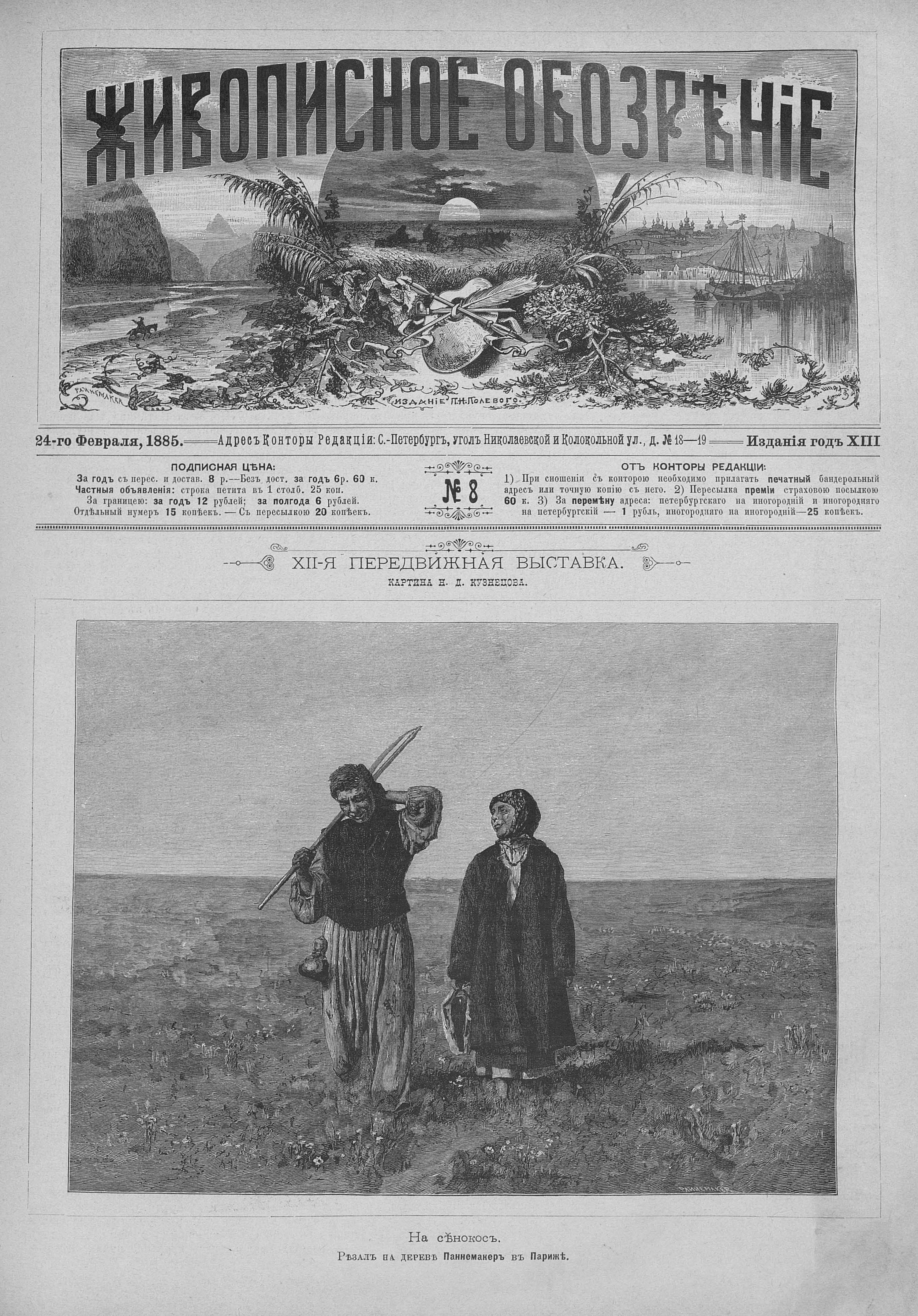 Живописное обозрение стран света : иллюстрированный журнал путешествий, исследований и проч.; художественно-литературный журнал; иллюстрированный журнал; ... / Ред. Н. И. Зуев, Н. И. Шульгин, П. Н. Полевой, С. Е. Добродеев, А. П. Нестор, И. Н. Потапенко, П. В. Быков, А. К. Шеллер, К. С. Баранцевич. — Спб.: типография Спб. акц. общ. «Слово», 1872—1905. — полные годовые подшивки, еженед.